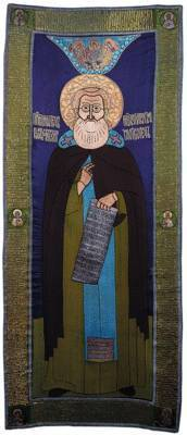 Прп. Александр Свирский. Покров. 1644 г. (ГРМ)